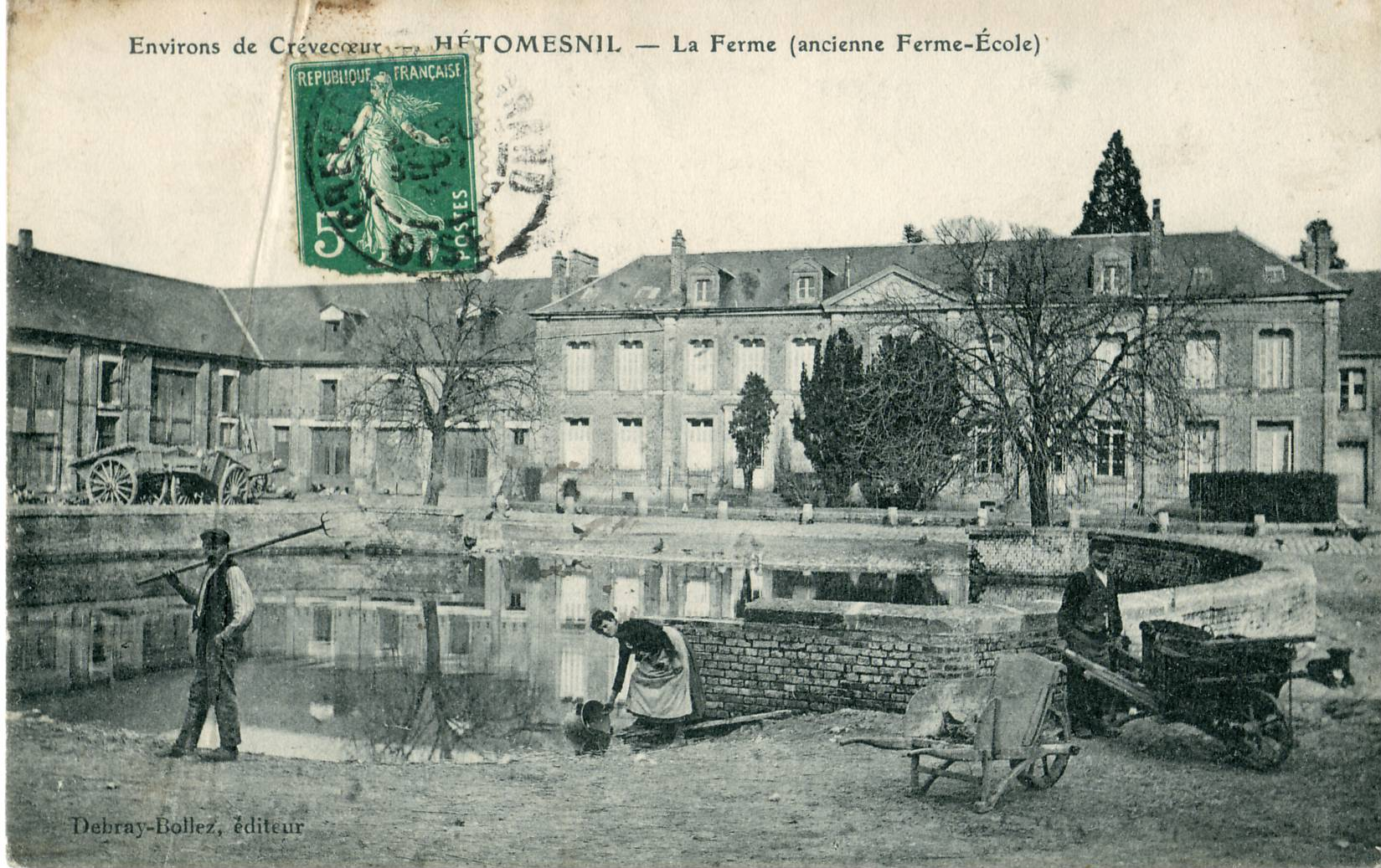 Carte postale ancienne éditée par Debray-Bollez Environs de Crèvecœur : HÉTOMESNIL - La Ferme (ancienne Ferme-École)